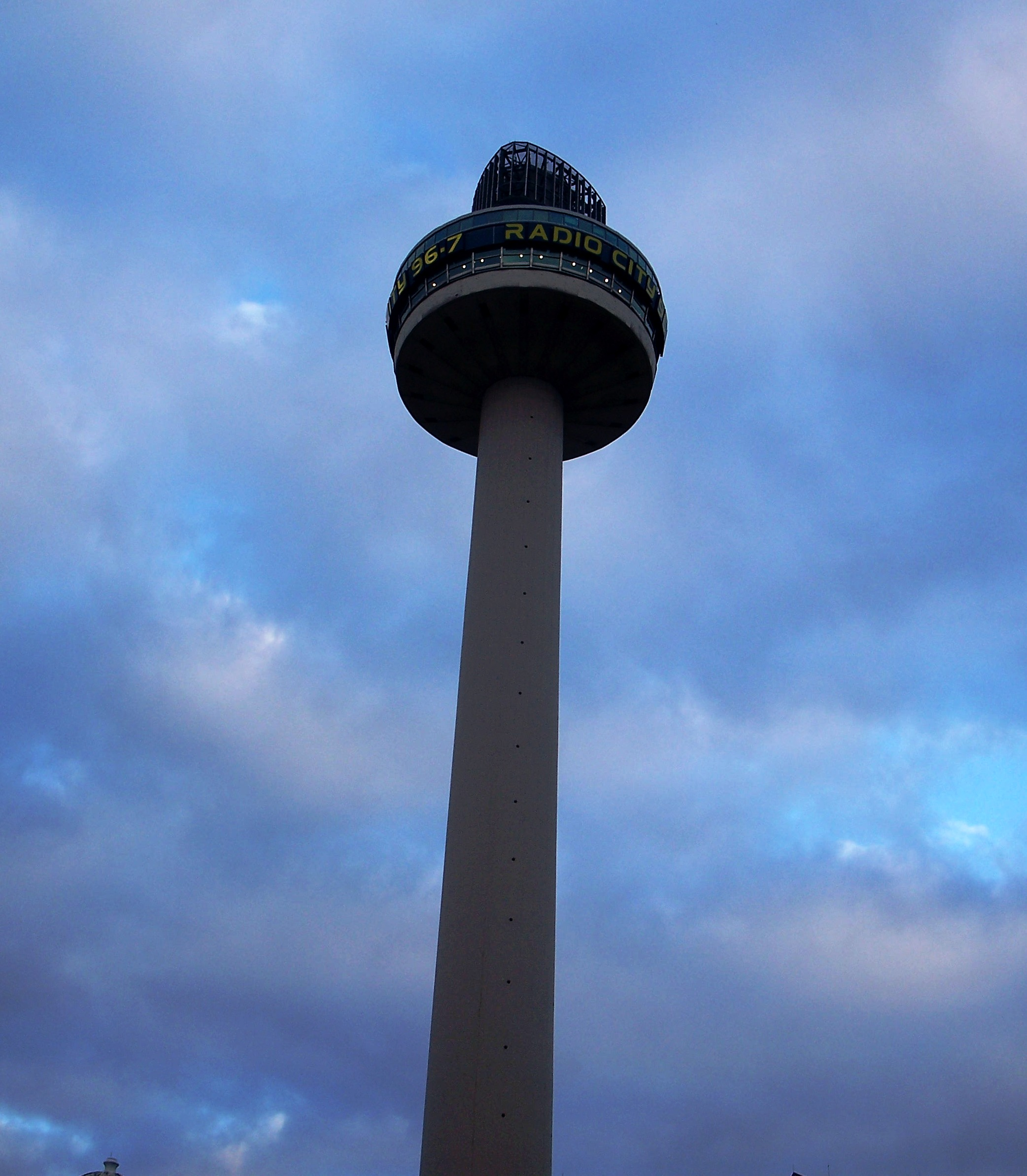 Radio_City_(Liverpool)_2008